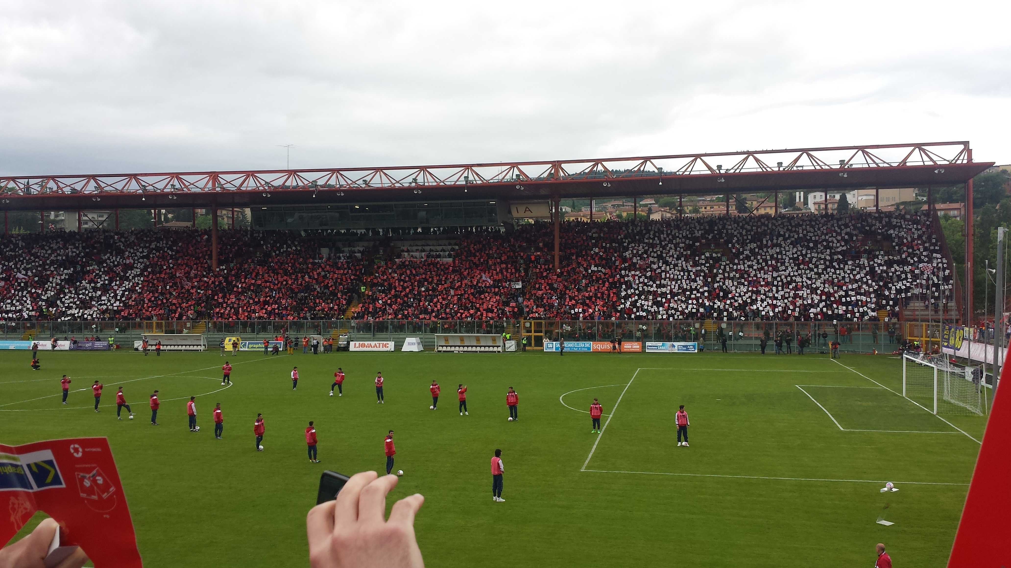 4 maggio